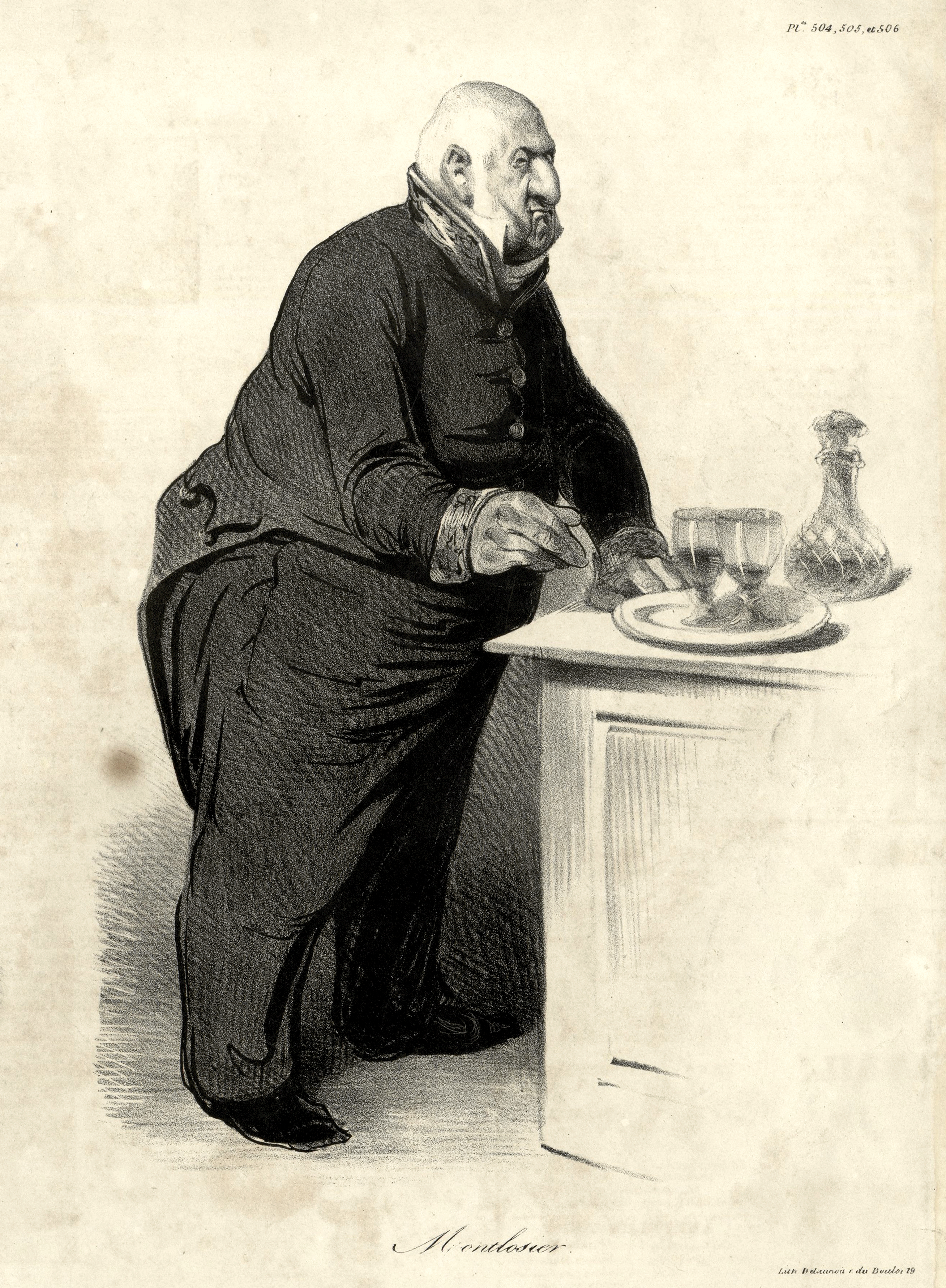 Caricature of François Dominique de Reynaud, Comte de Montlosier (1755–1838), French politician and political writer.